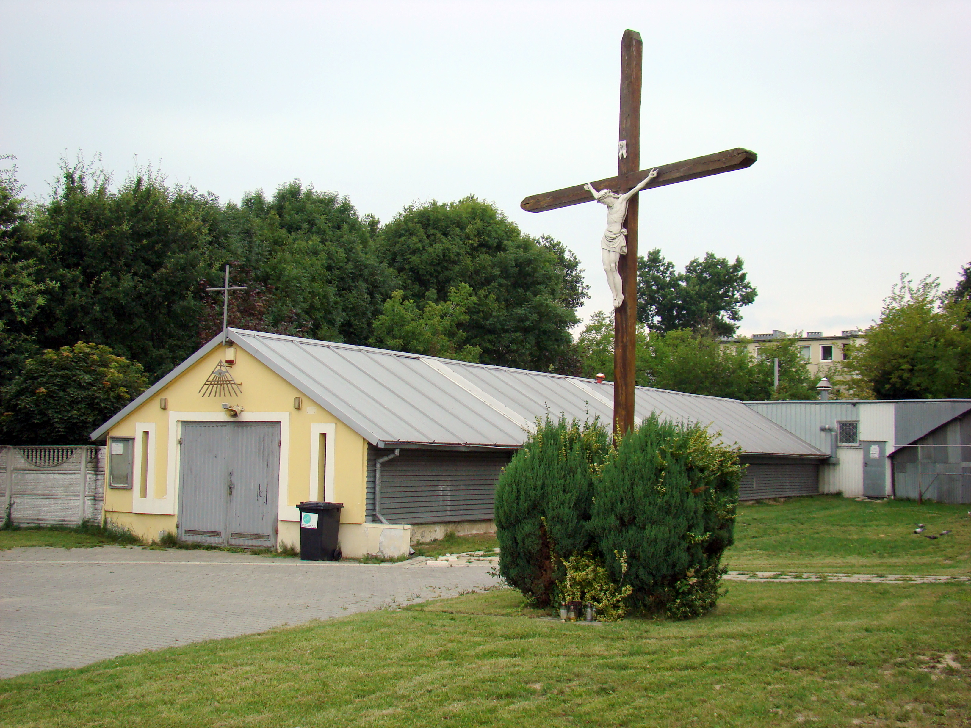 Tymczasowa kaplica parafii Zesłania Ducha Świętego w Częstochowie, zaadoptowana ze szklarni w 2001 roku.